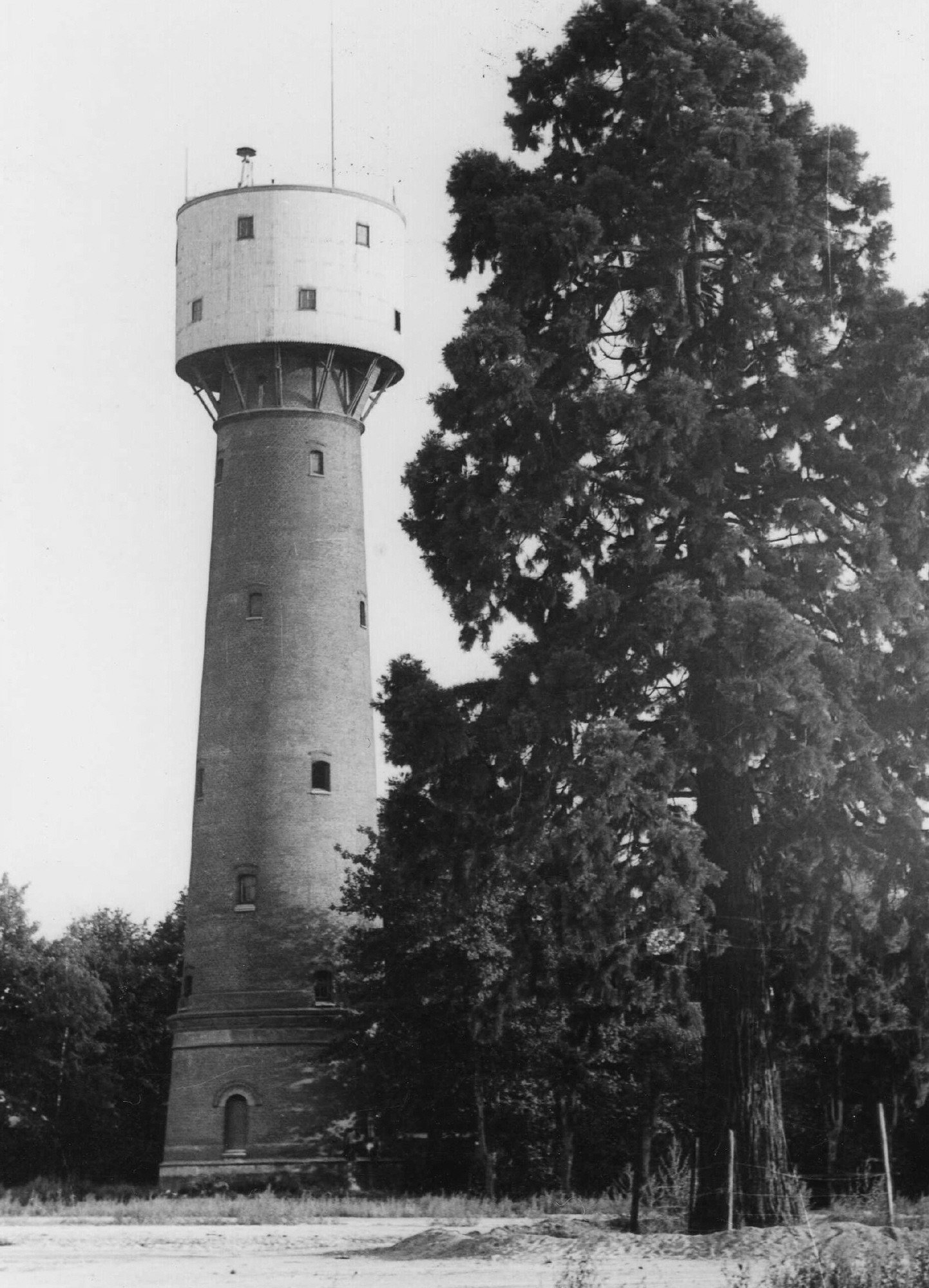 Watertoren Ede